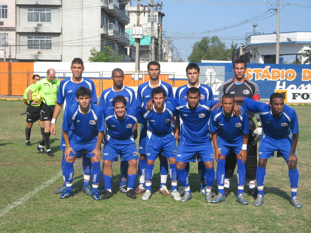 Equipe profissional do CFZ do Rio, em 2007. Foto de Paulo Roberto Rodrigues.